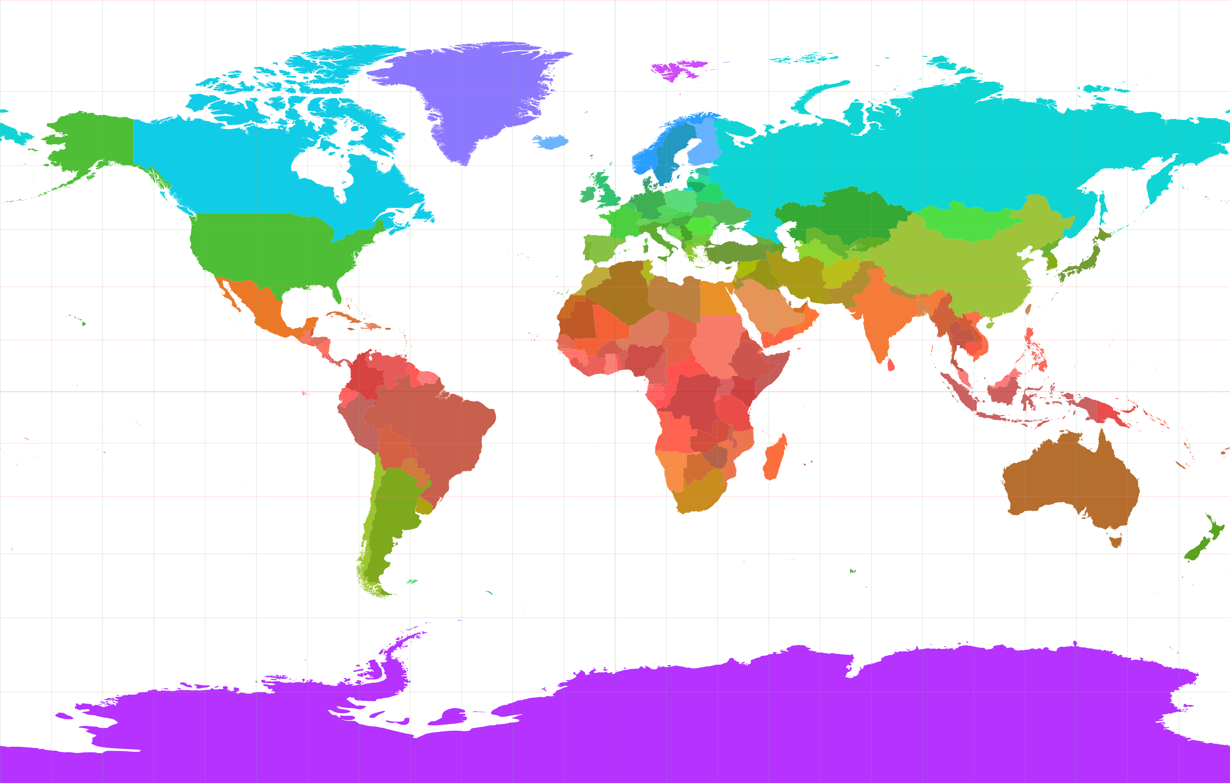 Staatkundige kaart van de Wereld in stereografische cilinderprojectie met kleuren die varieren met de breedtegraad